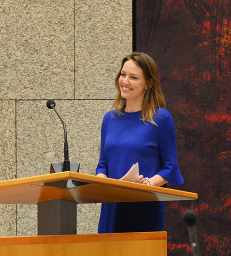 Bente Becker